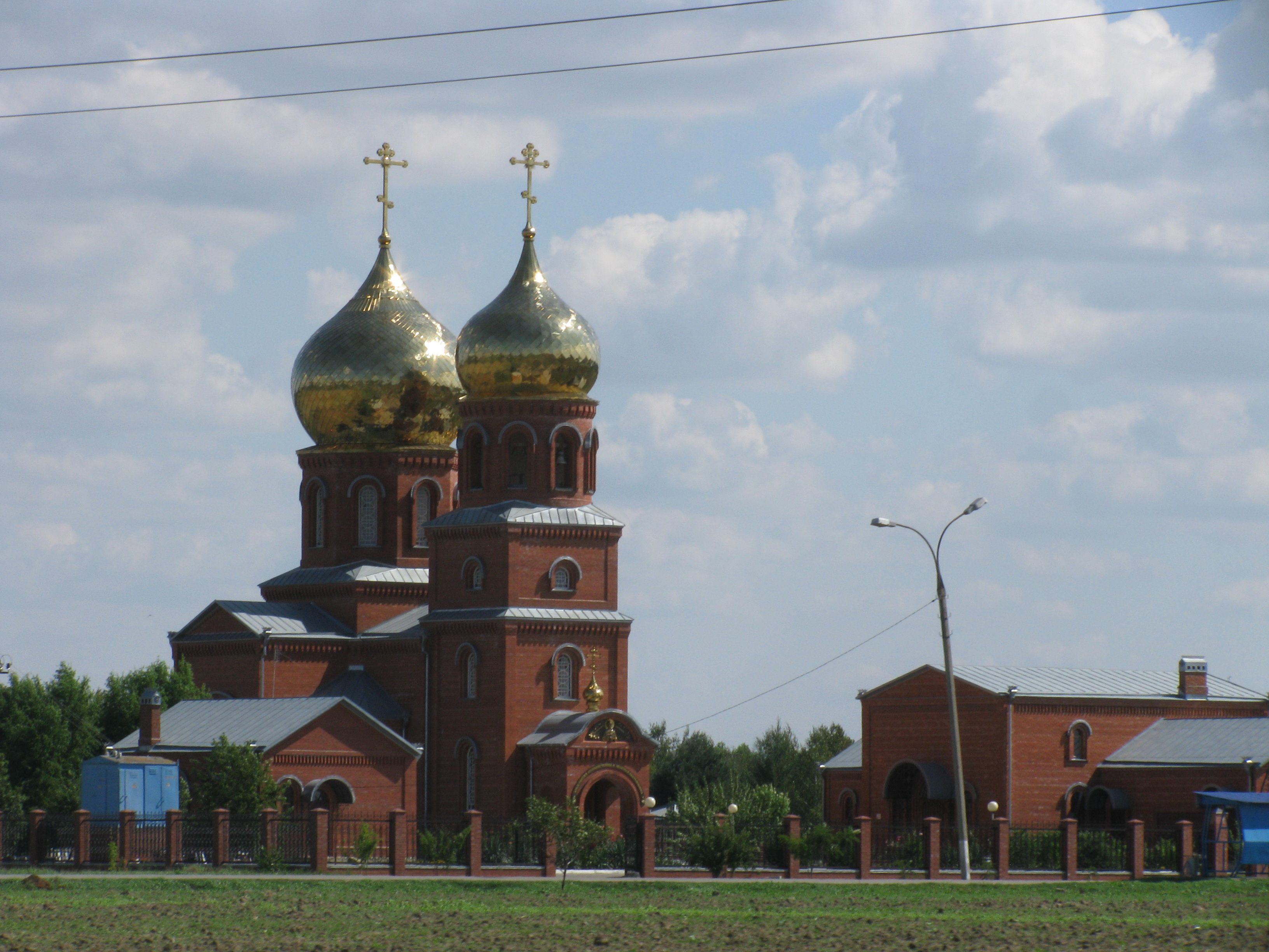 Храм Святого Пантелеймона (на выезде из города Славянск-на-Кубани)